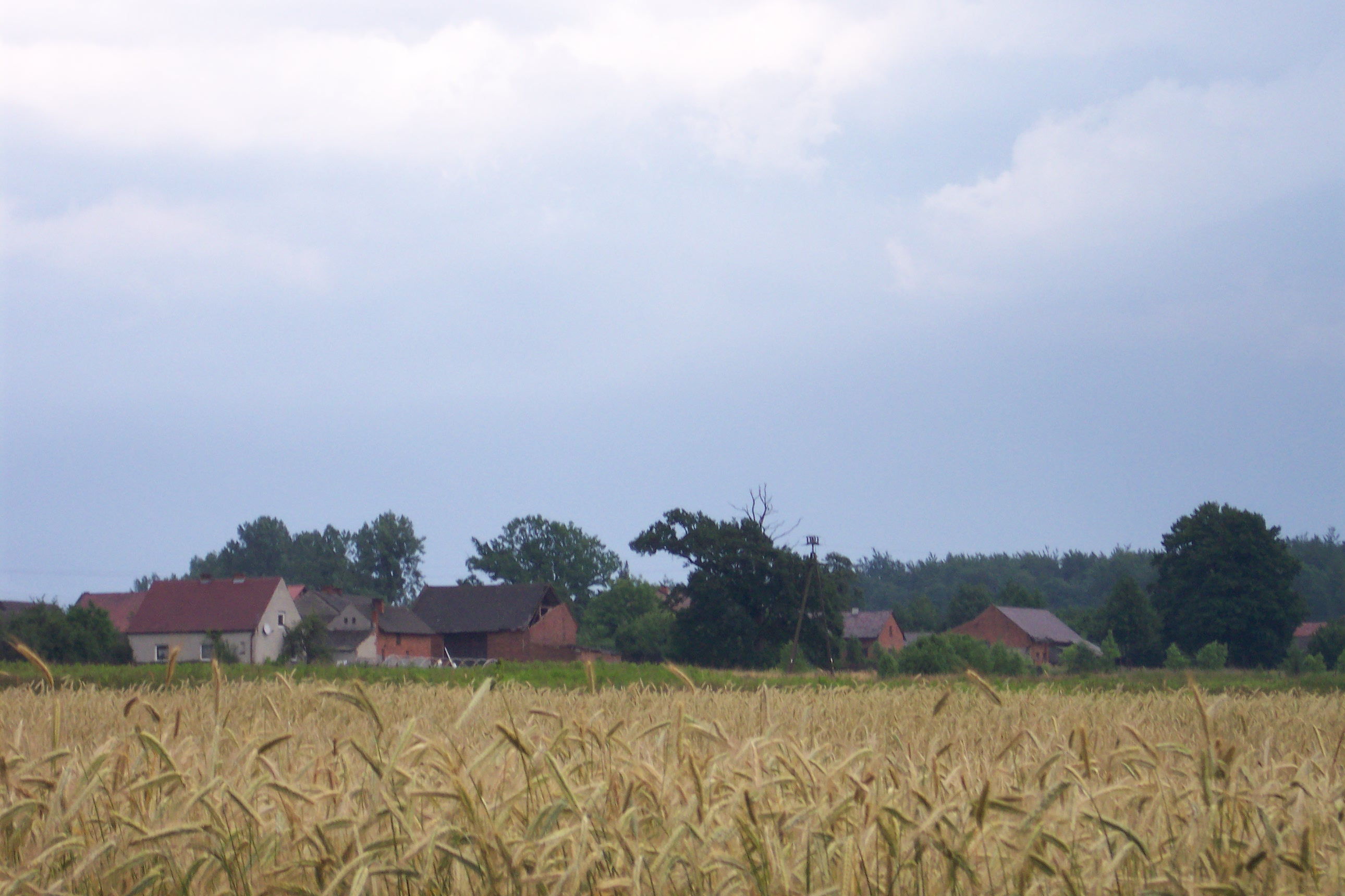 Osiecko (woj. opolskie)